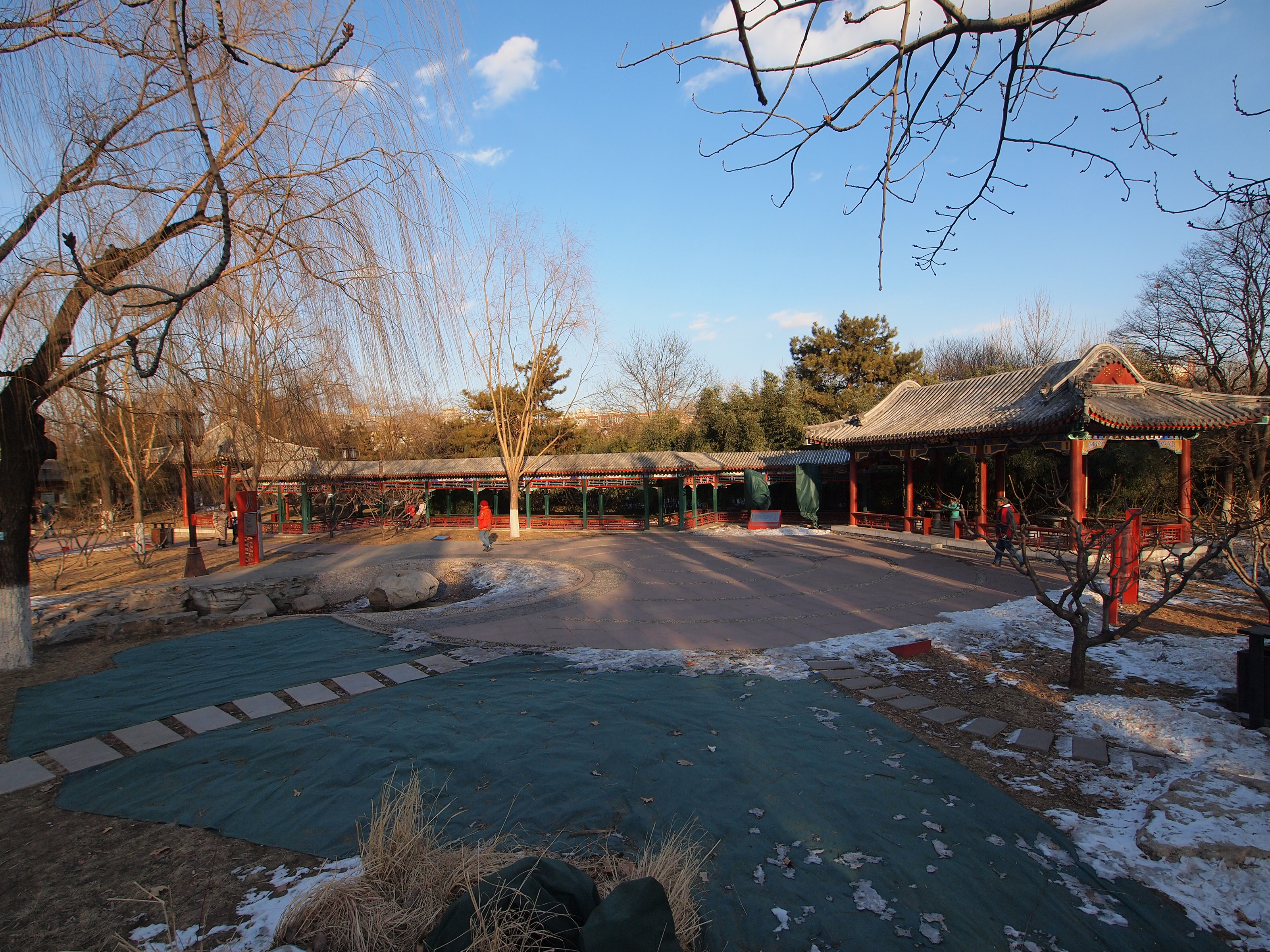 中医药文化养生园 - Chinese Medicine Culture Garden - 2013.01